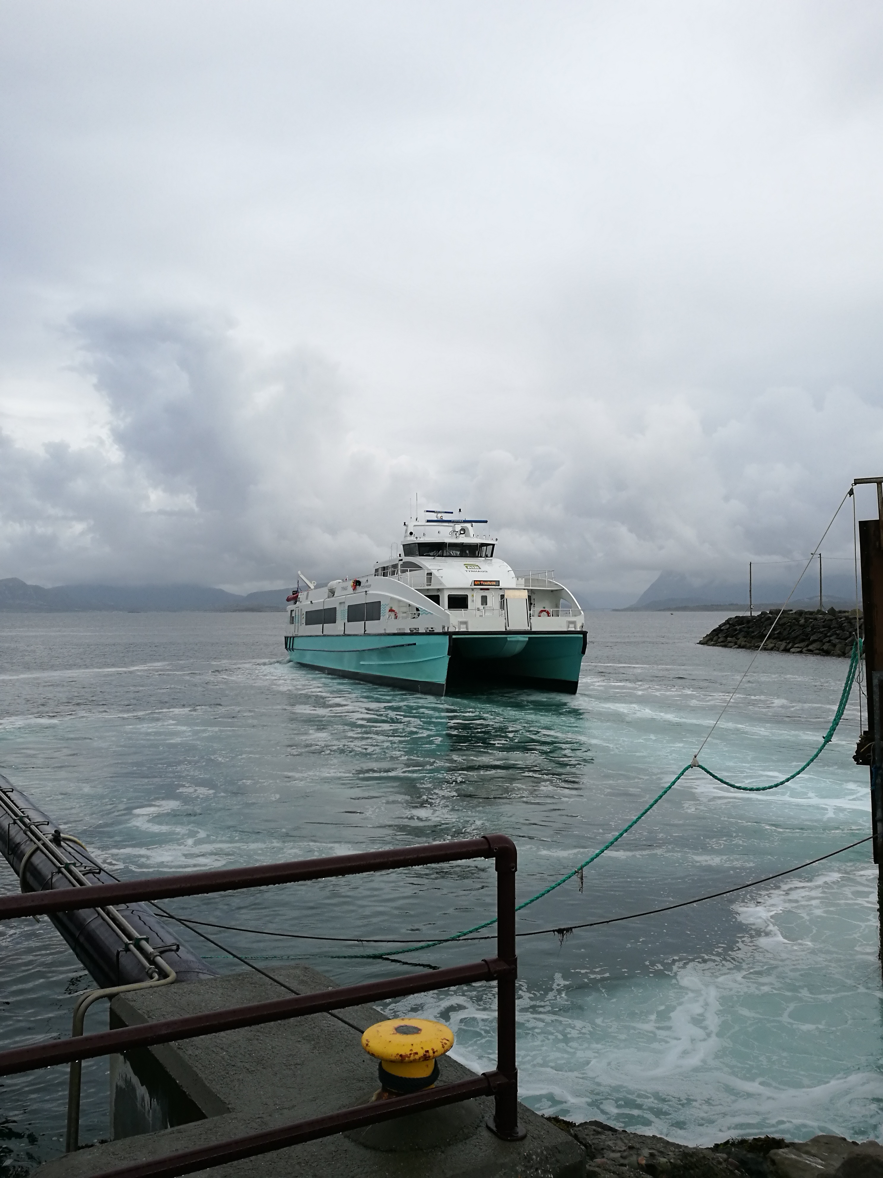 Anløp av Hurtigbåten MS «Tyrhaug» mellom Kristiansund og Trondheim ved Edøya ferjekai.